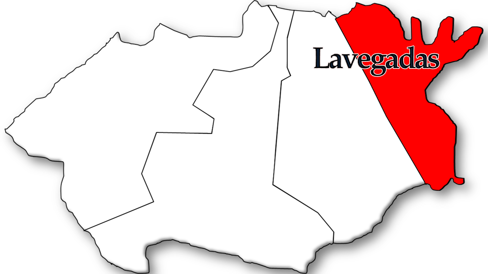 População